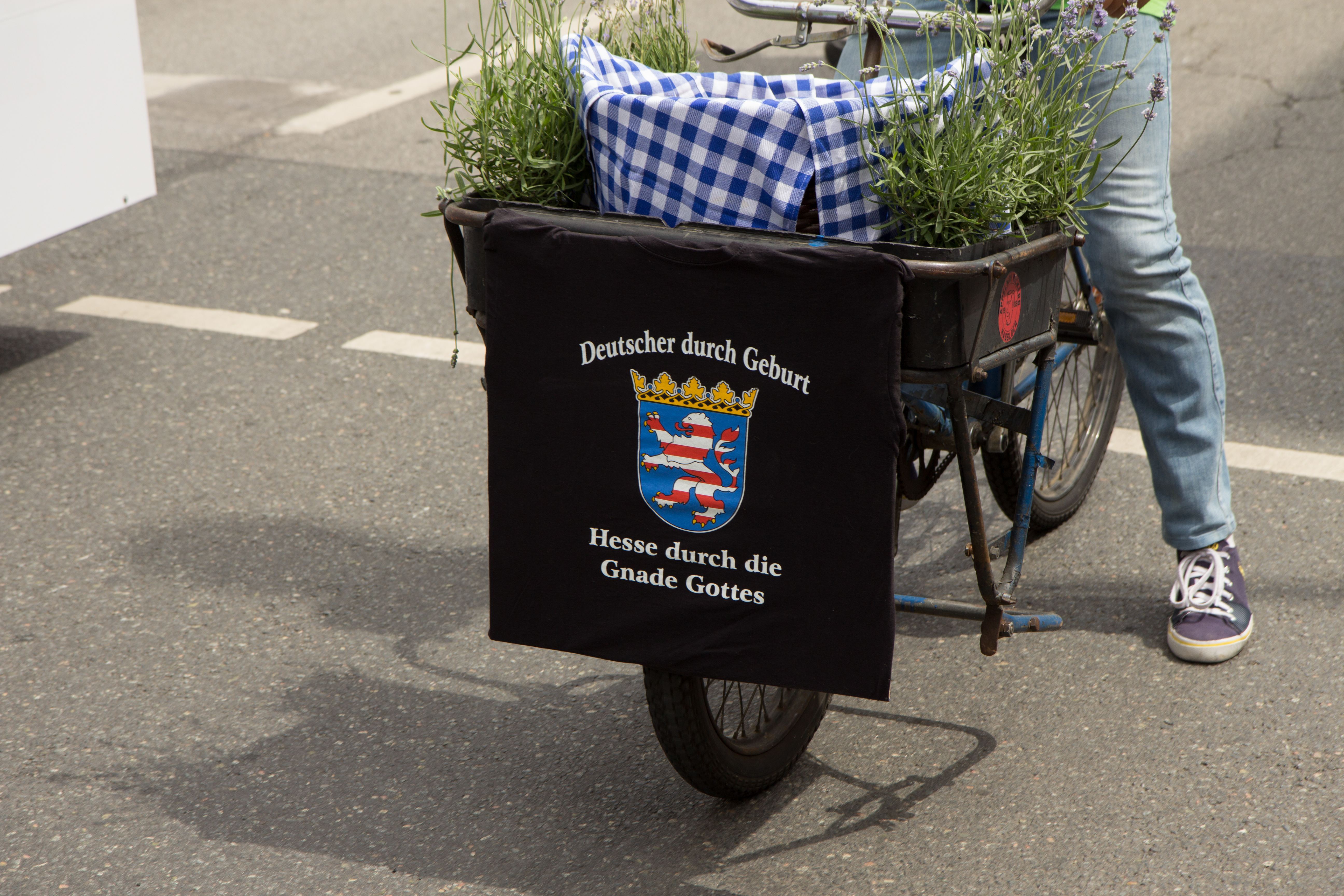 Umzug zum Hessentag in Rüsselsheim am 18. Juni 2017